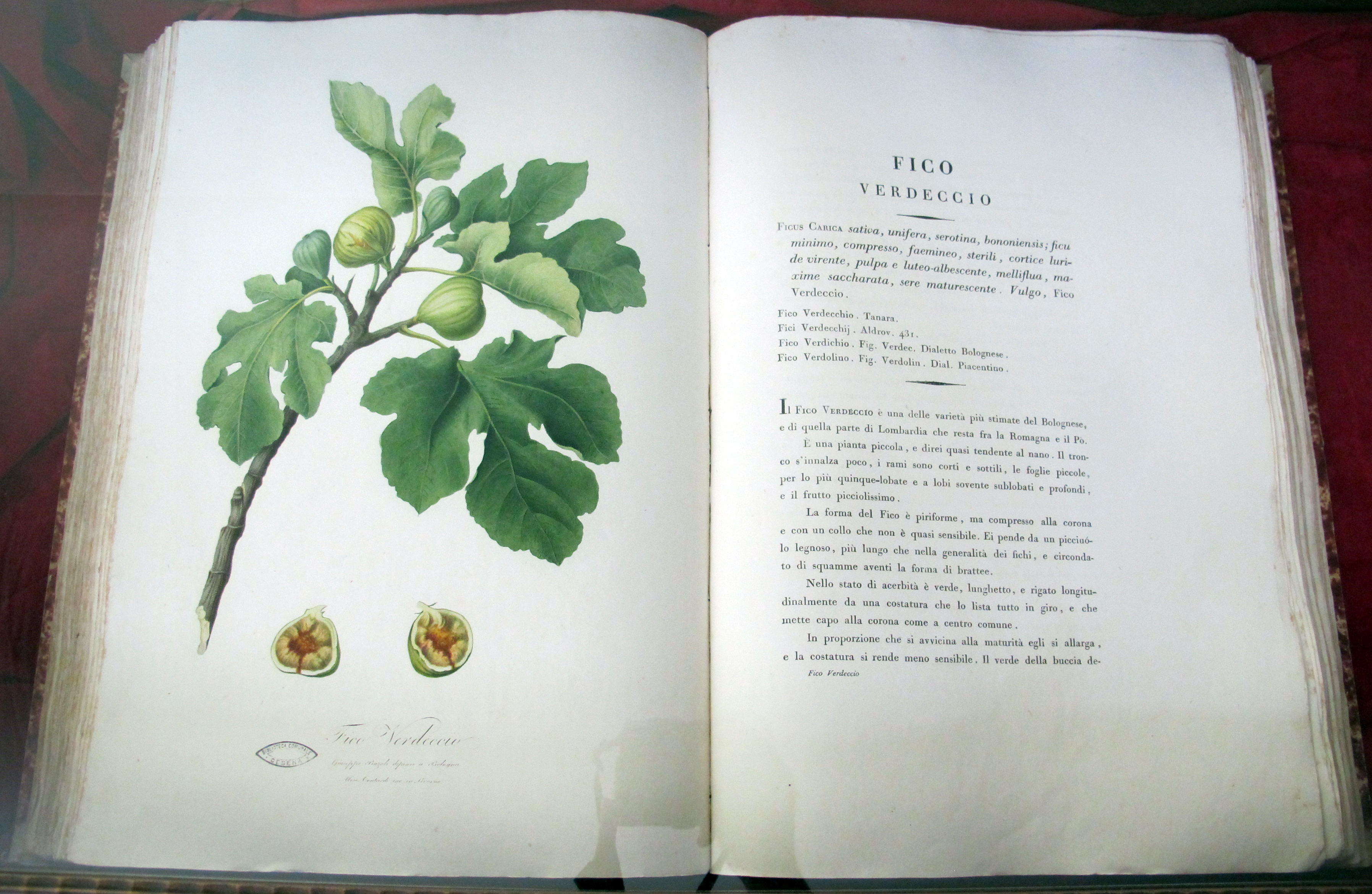 Biblioteca Malatestiana - MIBAC This is a photo of a monument which is part of cultural heritage of Italy.